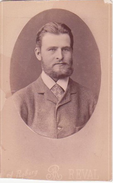 Heinrich Tiidermann